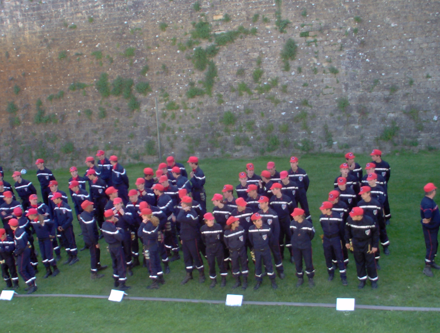 rassemblement des section de la gironde lors du concour de manoeuvre en 2003